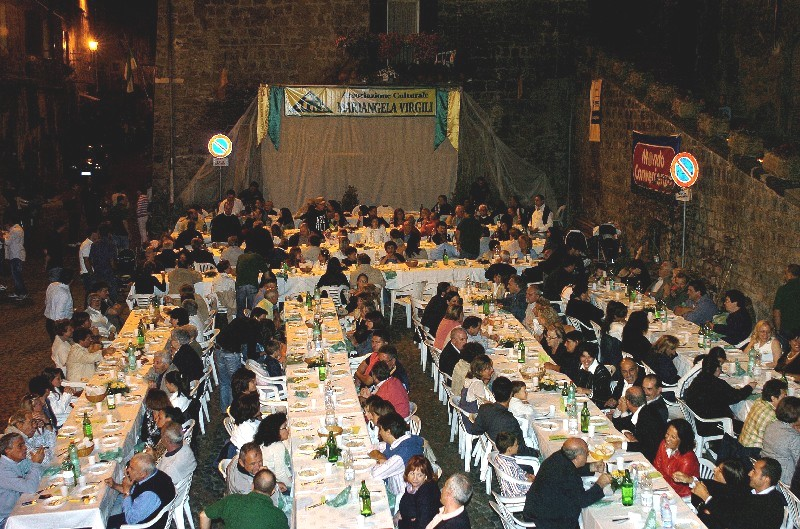 Festa di Santa Maria della Provvidenza a Ronciglione